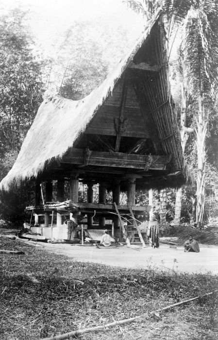 Repronegatief. Wevende vrouw voor een grote rijstschuur (sopo), Tobalanden